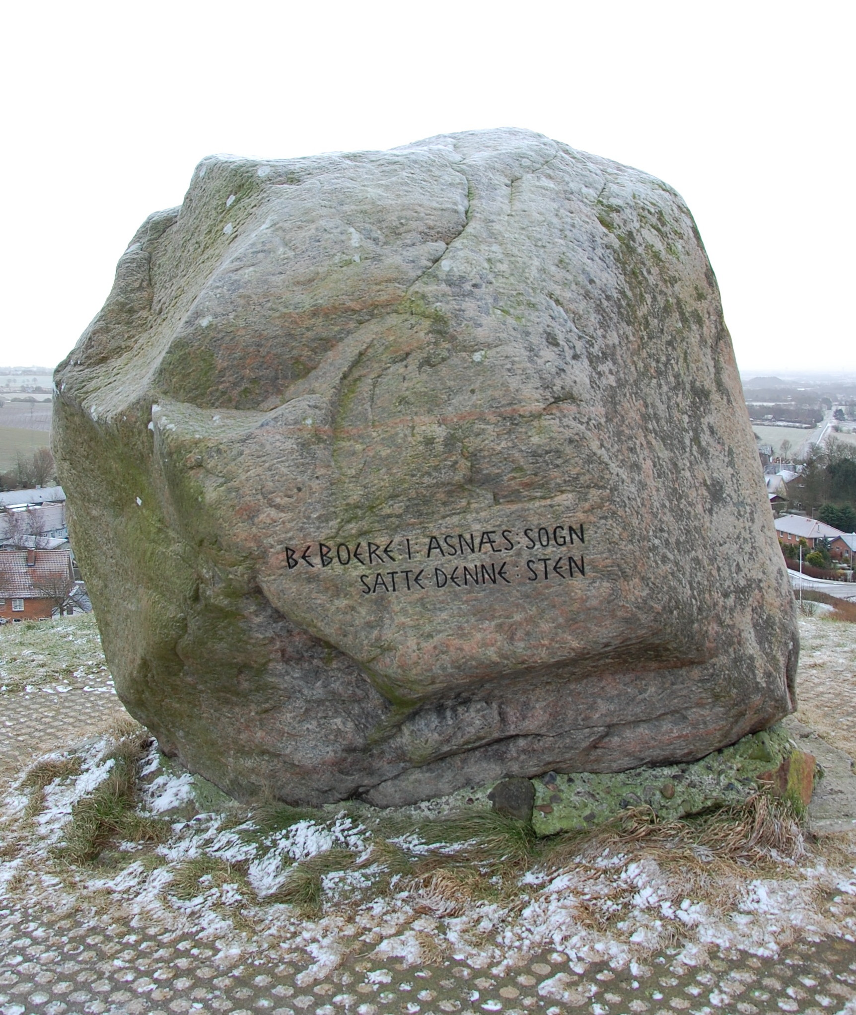 Esterhoj, Gedenkstein Rückseite